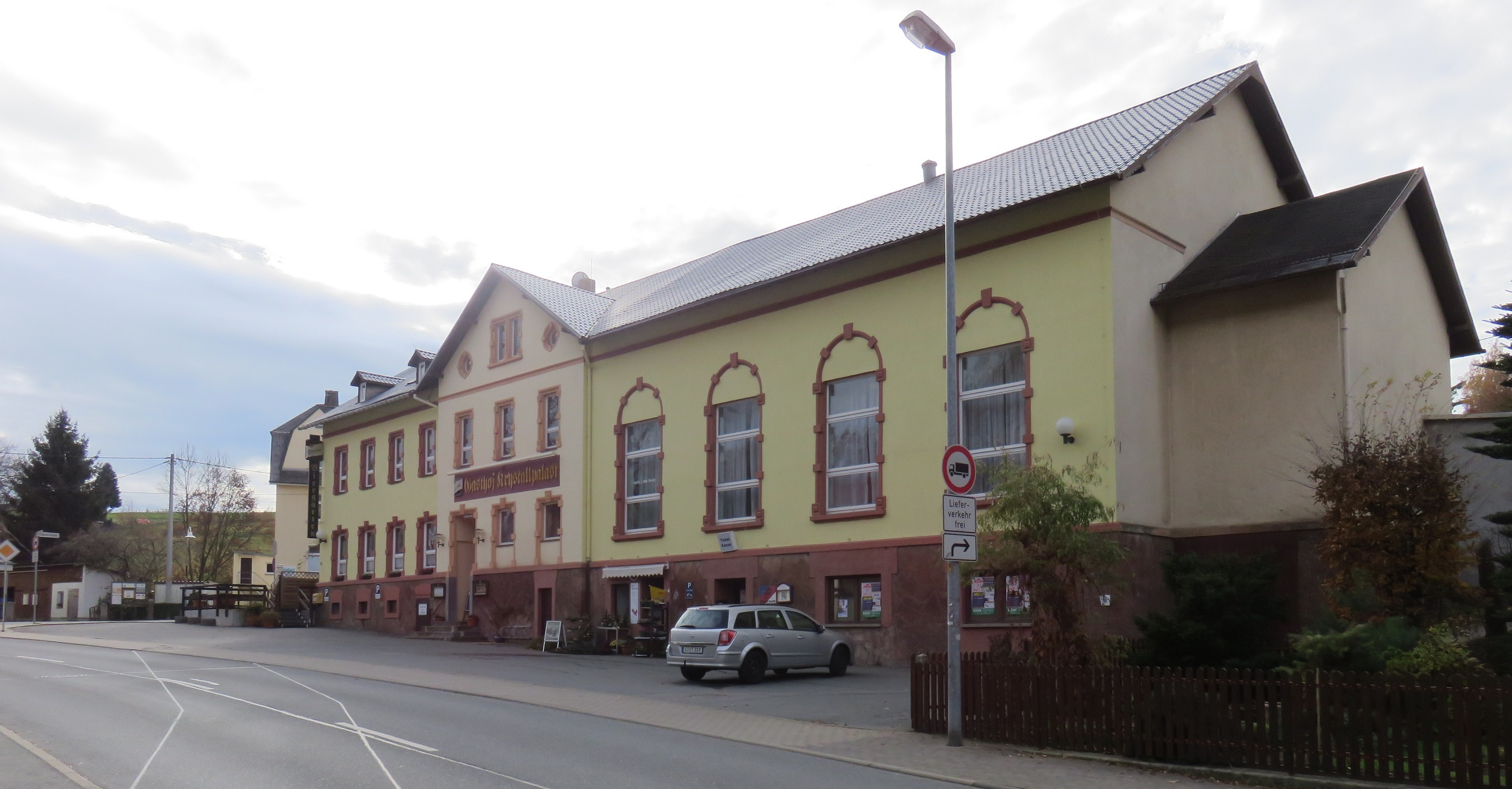 Gast und Gewerbehaus, Klaffenbacher Hauptstraße 52. Kulturdenkmal Chemnitz-Klaffenbach.